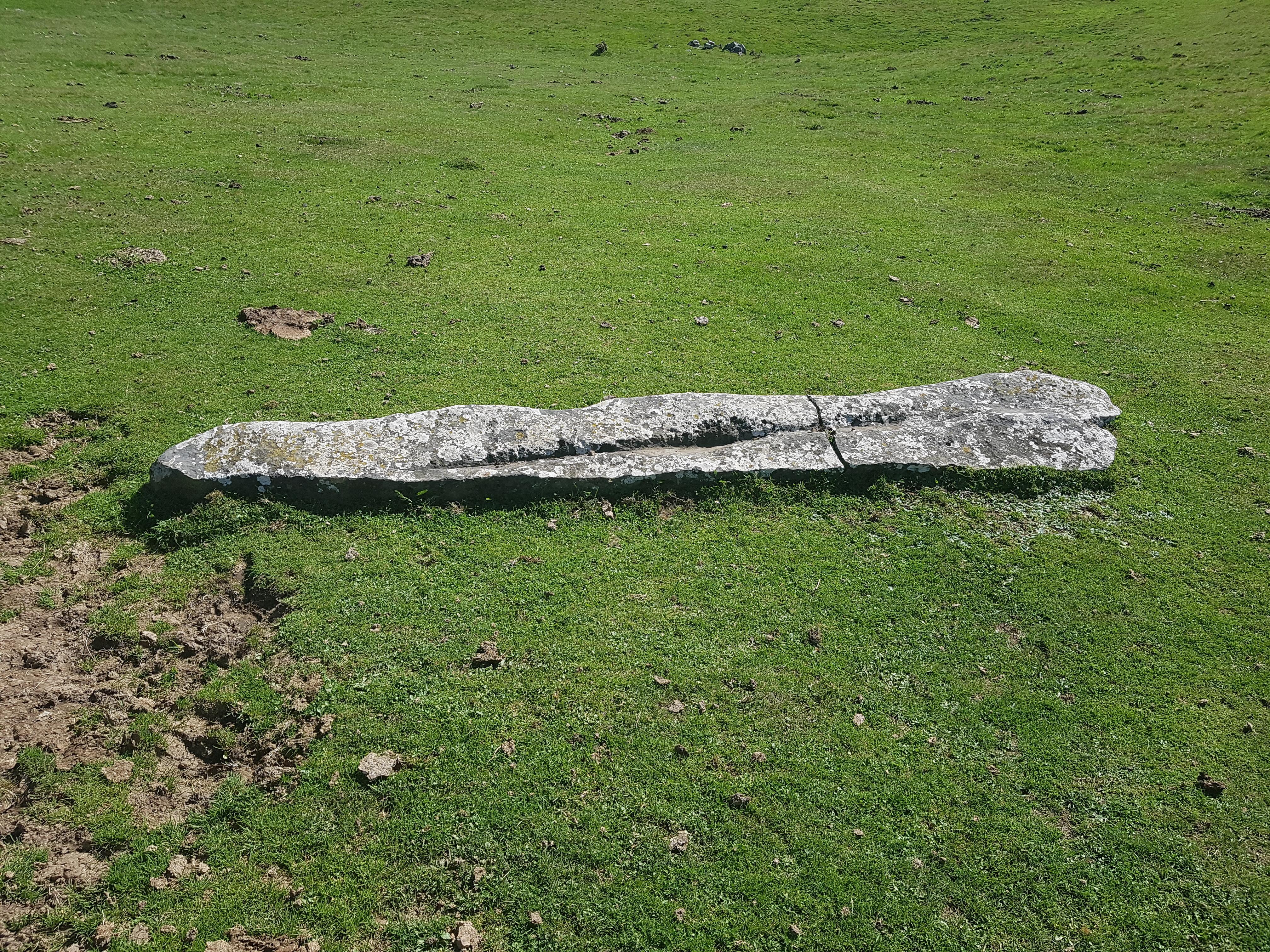 Aralarreko alde gipuzkoarrean dagoen etzandako zutarri edo menhirra